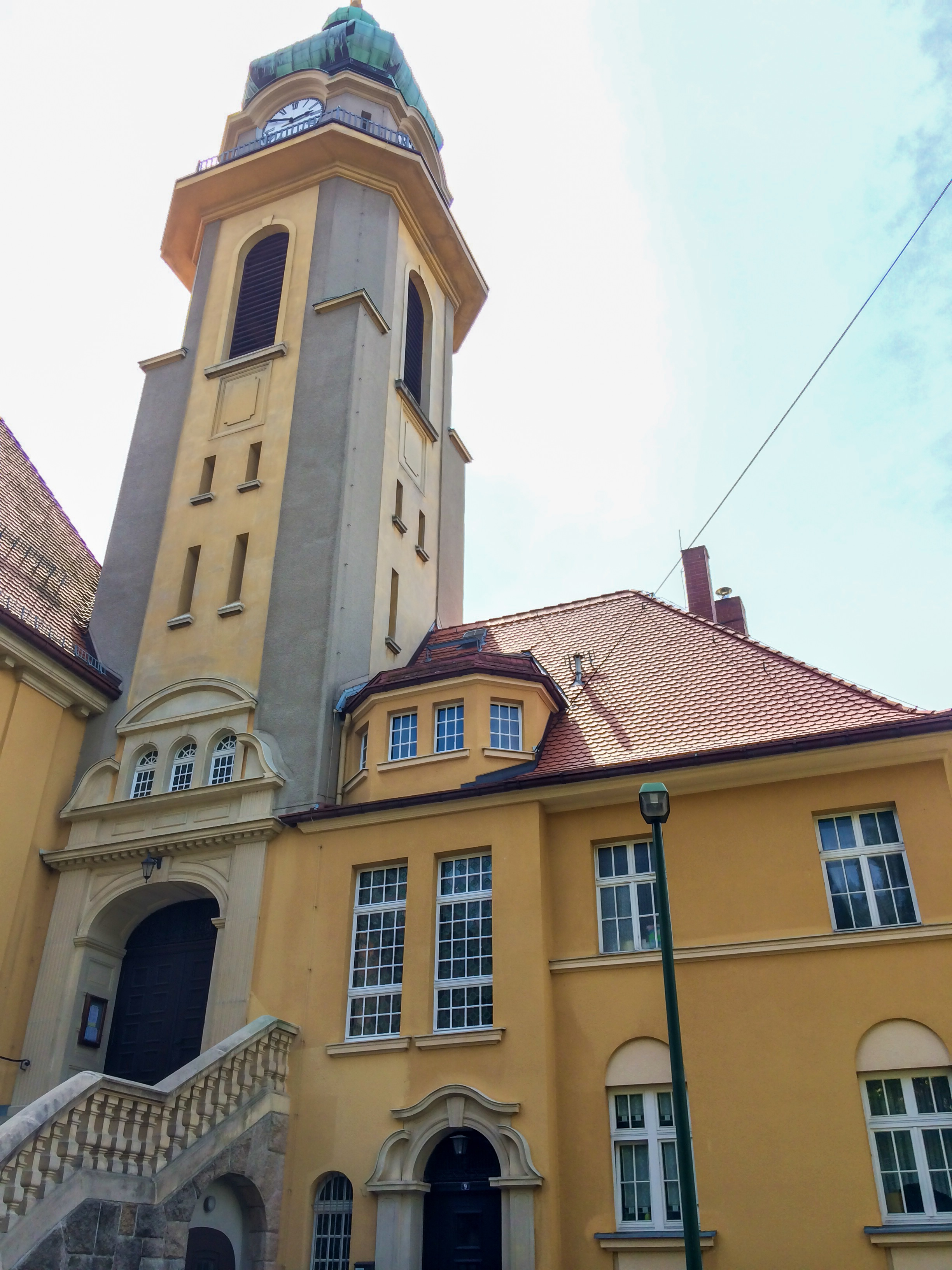 Katholische Kirche Zum Heiligen Kreuz Auerbach/Vogtland, Juli 2014